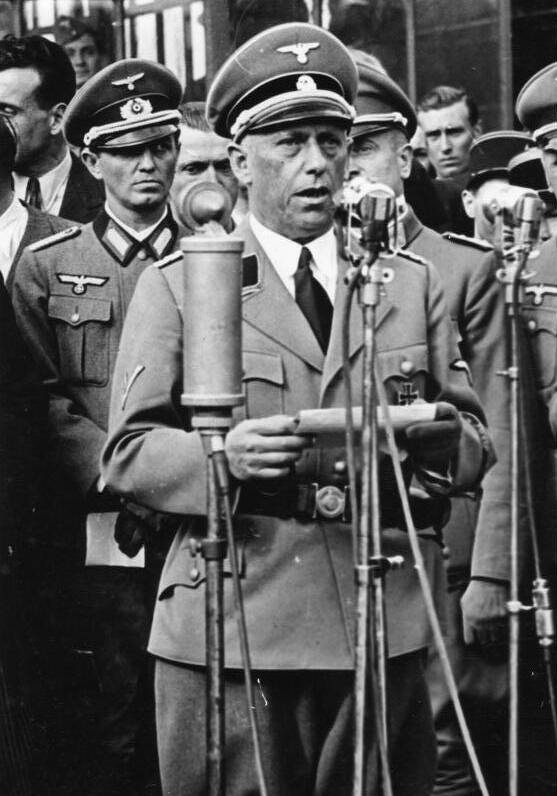 Julius Ritter Assassinat de M. Julius Ritter.... N.p.m. : M. Julius Ritter, S.S.-Standartenfuhrer et représentant en France du commissaire général allemand á la main-d´oeuvre, (Gauleiter Sauckel) est tombé hier á Paris, victime d´un attentat terroriste.- Photo prise au premier départ d´ouvriers pour la Reléve. Archives Fulgur (Pala) 29.9.43 [Julius Ritter in Uniform vor Mikrofonen eine Rede verlesend] Abgebildete Personen: Ritter, Julius: SS-Standartenführer, Ritterkreuz (RK) zum Kriegsverdienstkreuz (KVK), Deutschland